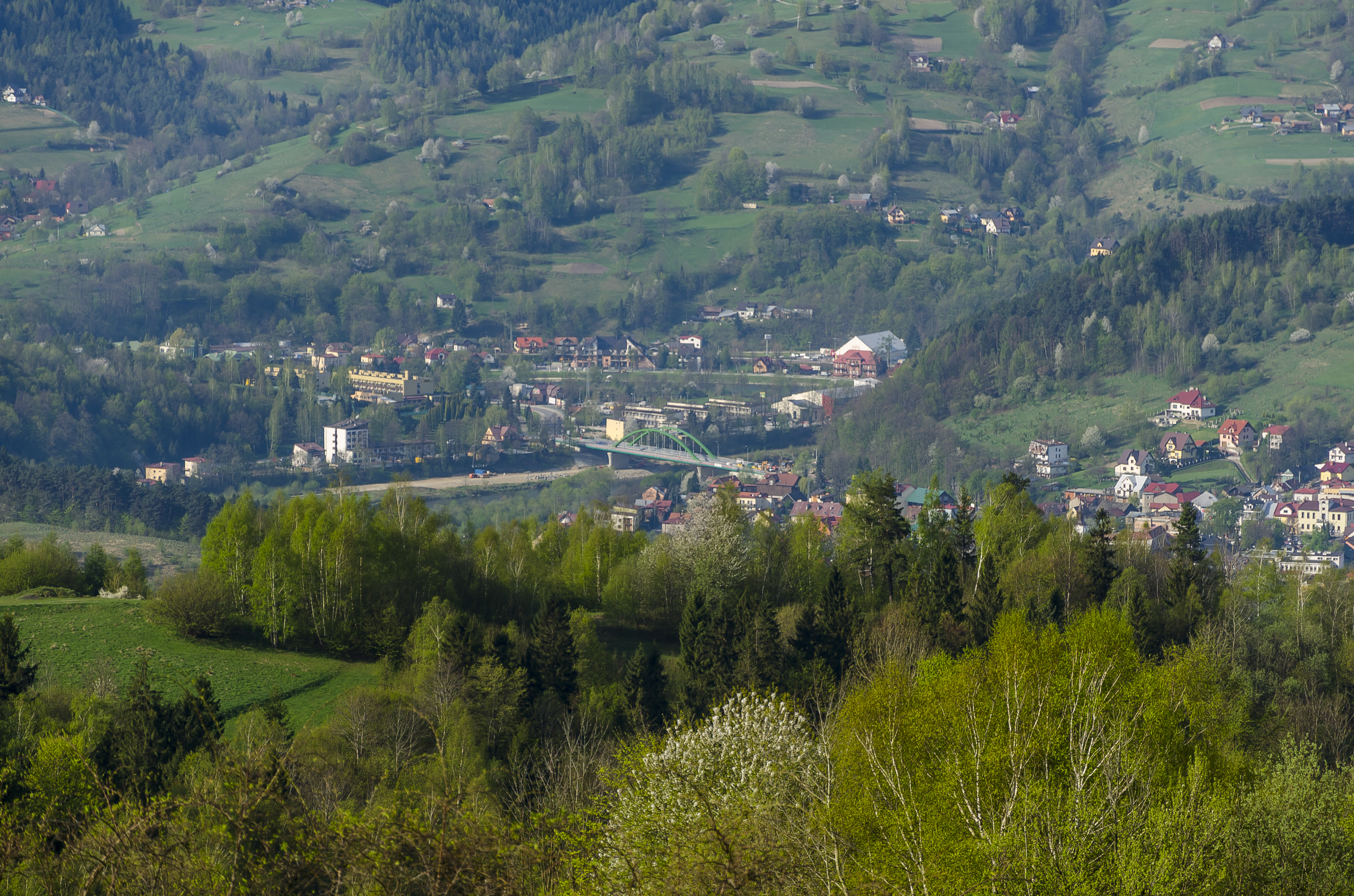 Piwniczna-Zdrój, Poland